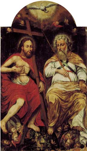 Тройца Новазапаветная. ХVІІІ ст. З в. Андронава Кобрынскага р-на. Музей старажытнабеларускай культуры НАН Беларусі